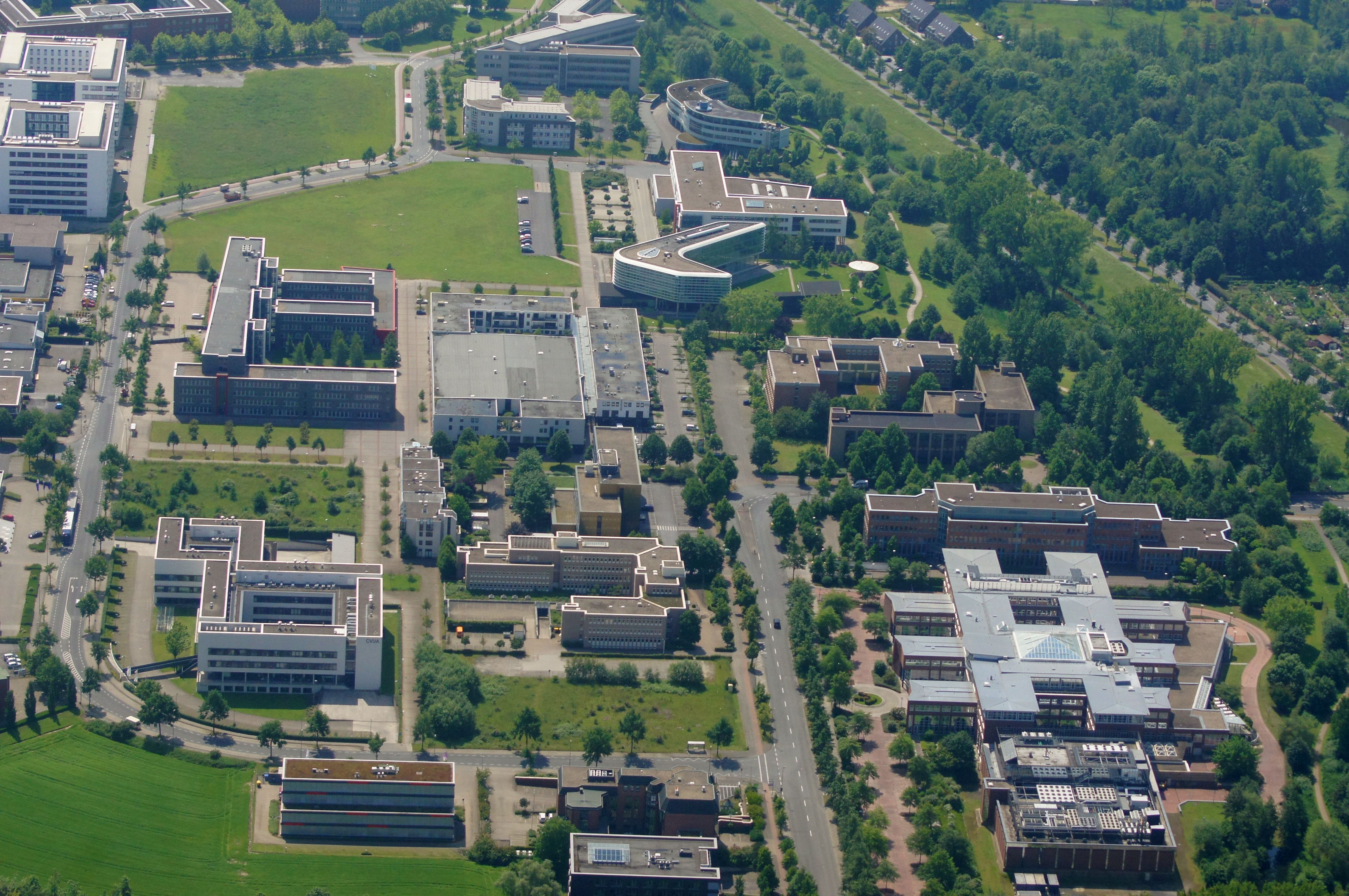 Zentrum Nord, Münster, Nordrhein-Westfalen. Das Foto entstand während des Münsterland-Fotoflugs am 1. Juni 2014. Hinweis: Die Aufnahme wurde aus dem Flugzeug durch eine Glasscheibe hindurch fotografiert.